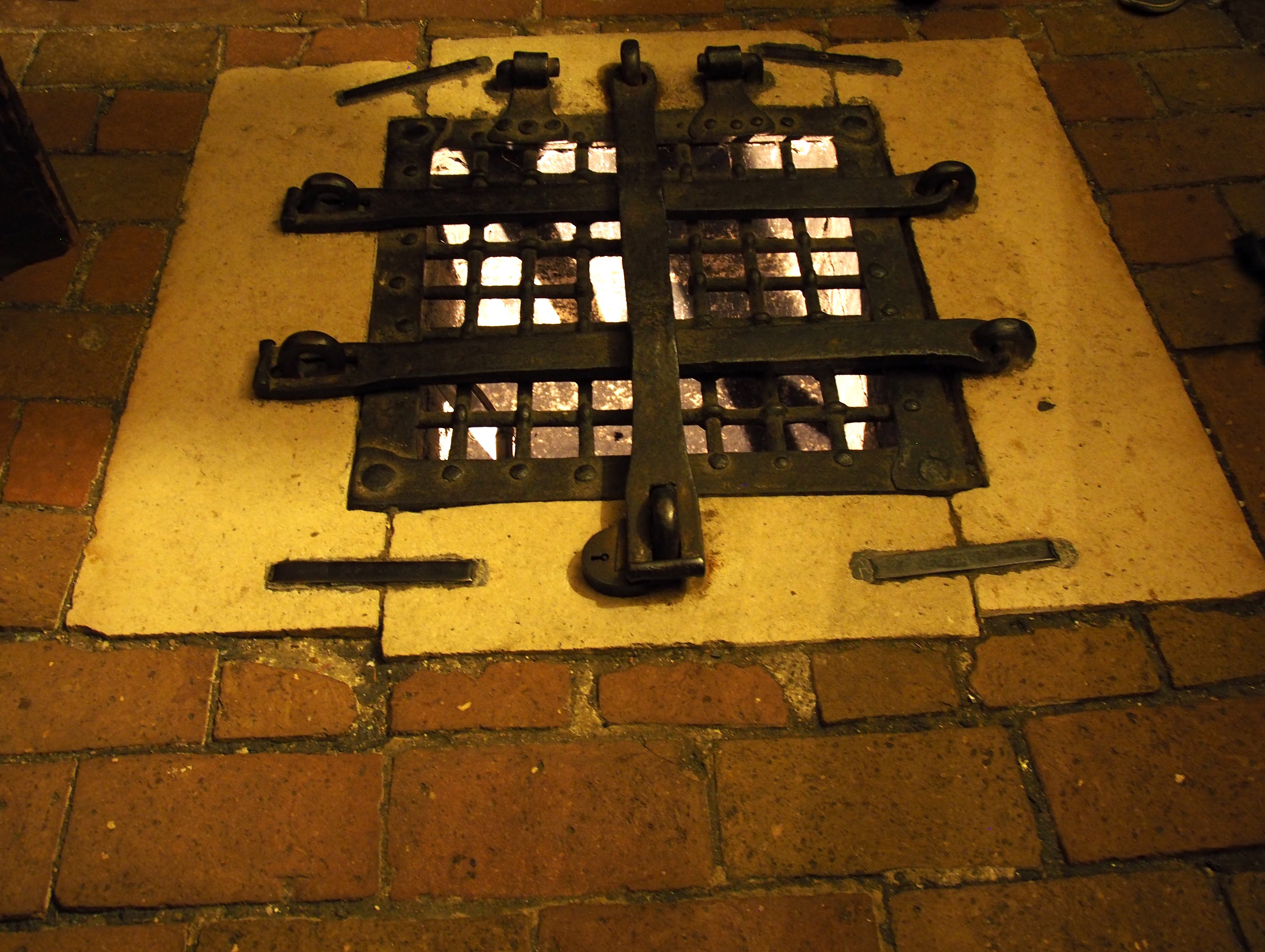 Fragstatt Verlies